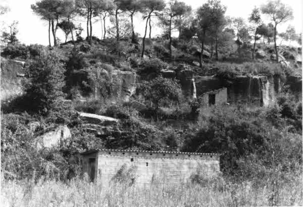 Fotografia de la localització del jaciment de Fons de Cabana de Torredenusa